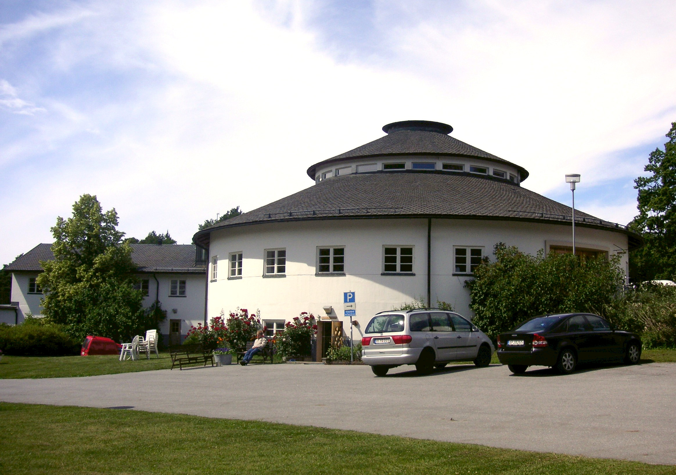 Frimurarebarnhuset i Blackerberg, Bromma, Stockholm. Matsalsbyggnaden.